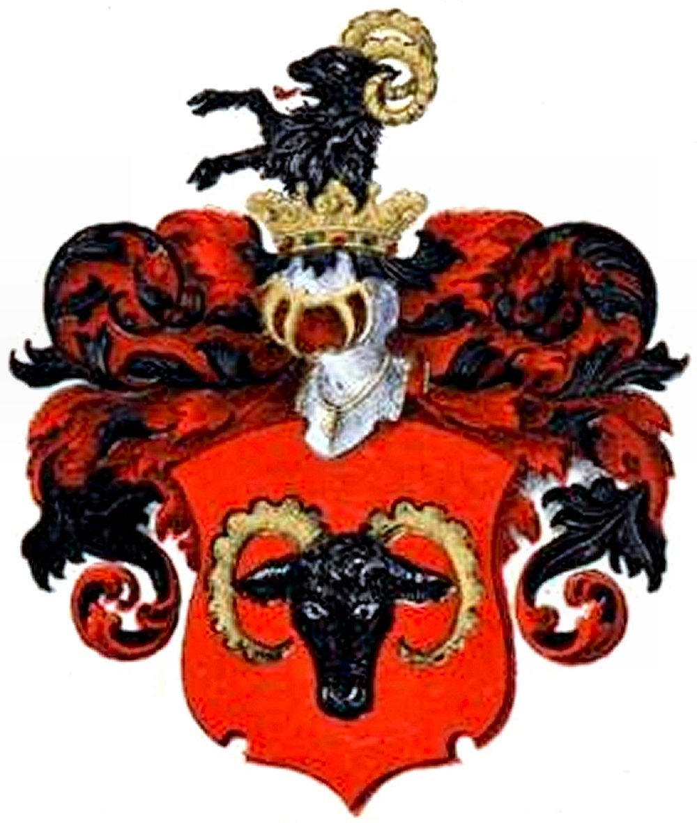 Rechenbergi suguvõsa aadlivapp